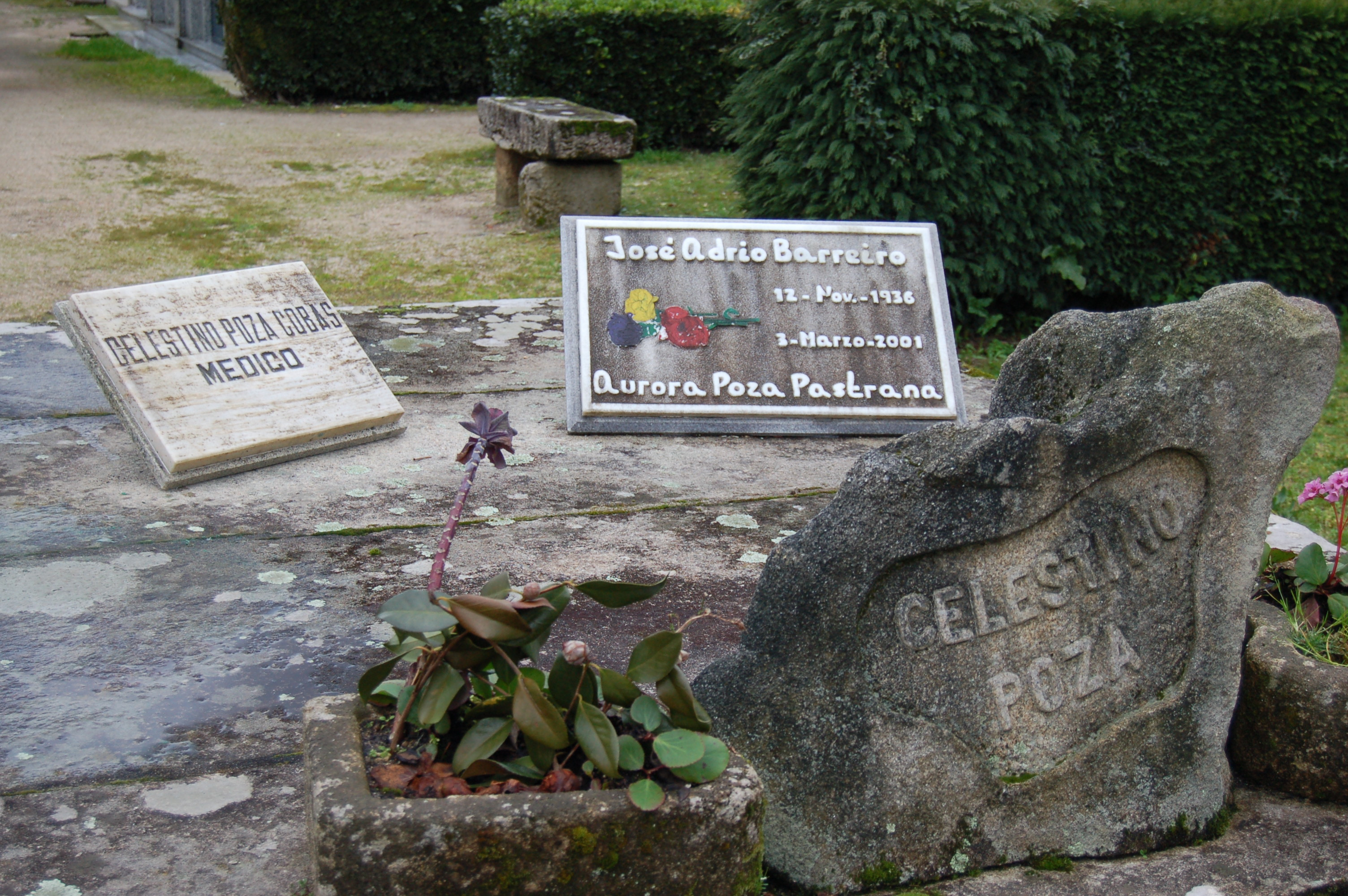 Sepulcro de Celestino Poza Cobas, José Adrio Barreiro e Aurora Poza Pastrana no Cemiterio de San Amaro de Pontevedra